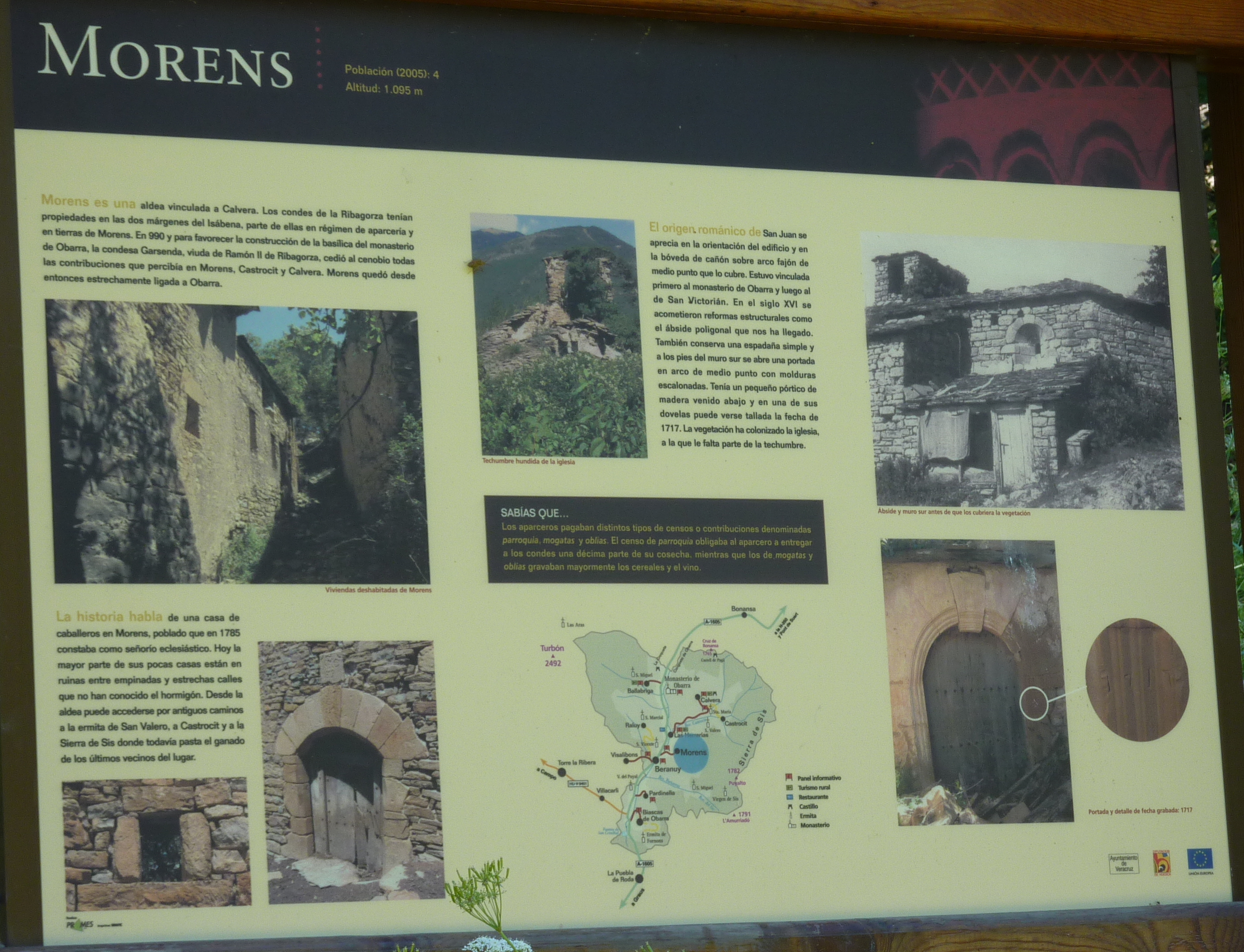 Morens in Aragonien (Spanien)